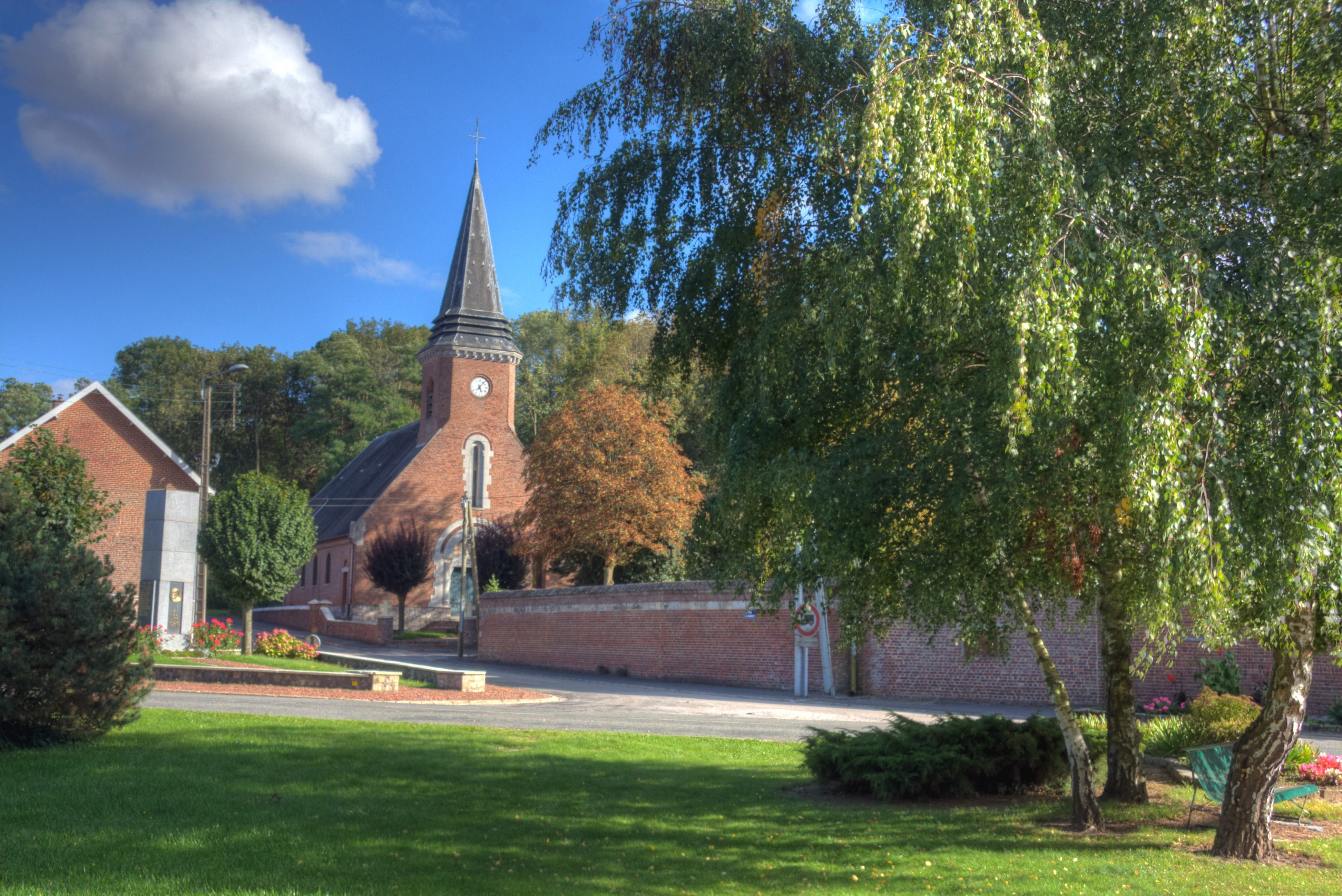 Le centre de Morchies